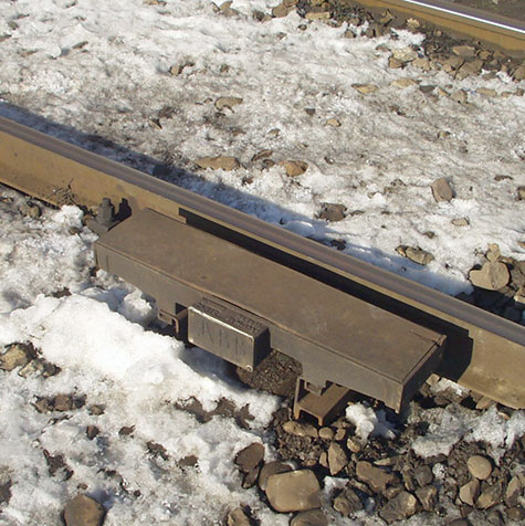 polnisches Zugsicherungssystem SHP: Gleismagnet